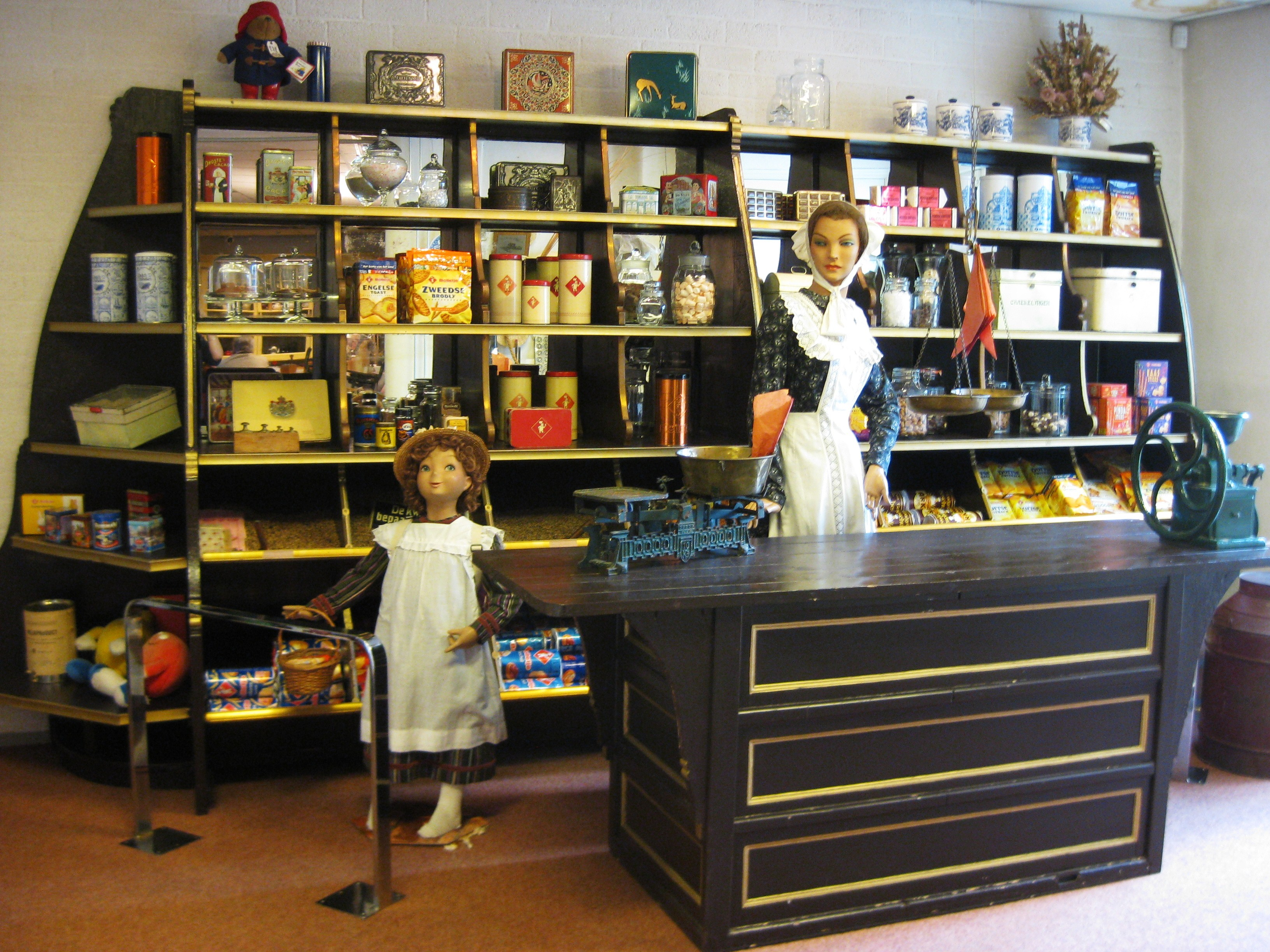 Museumwinkel Bolletje aan de Grotestraat in Almelo